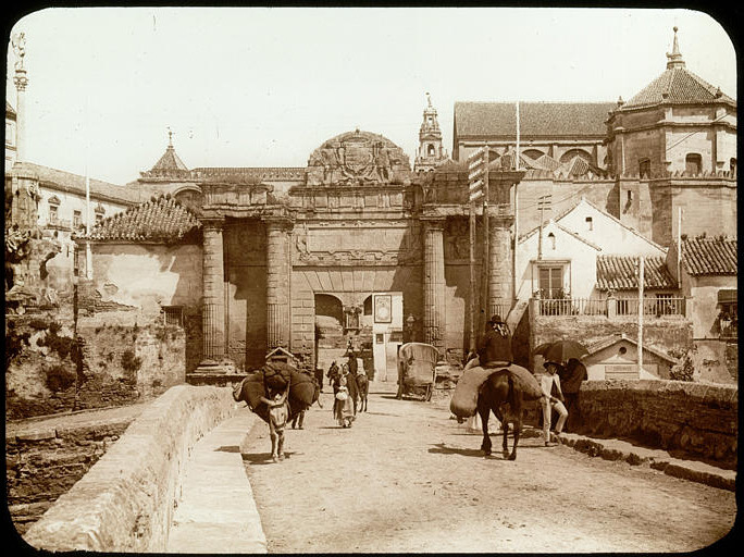 Puerta del Puente romano de Córdoba (España), fotografiada en 1897 por Marie-Joseph Henry de Lestrange (1853-1926)